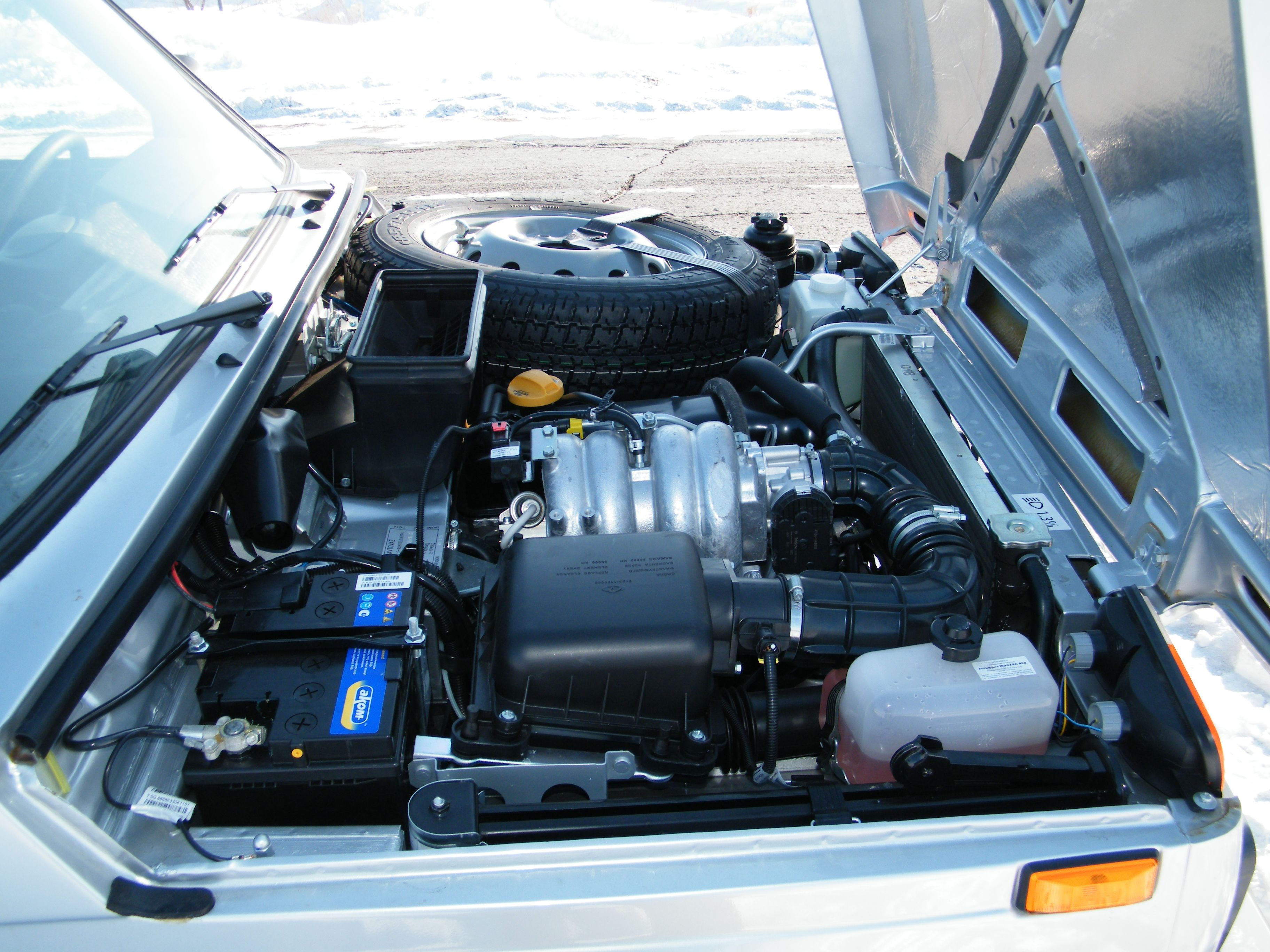 Lada Niva 2131